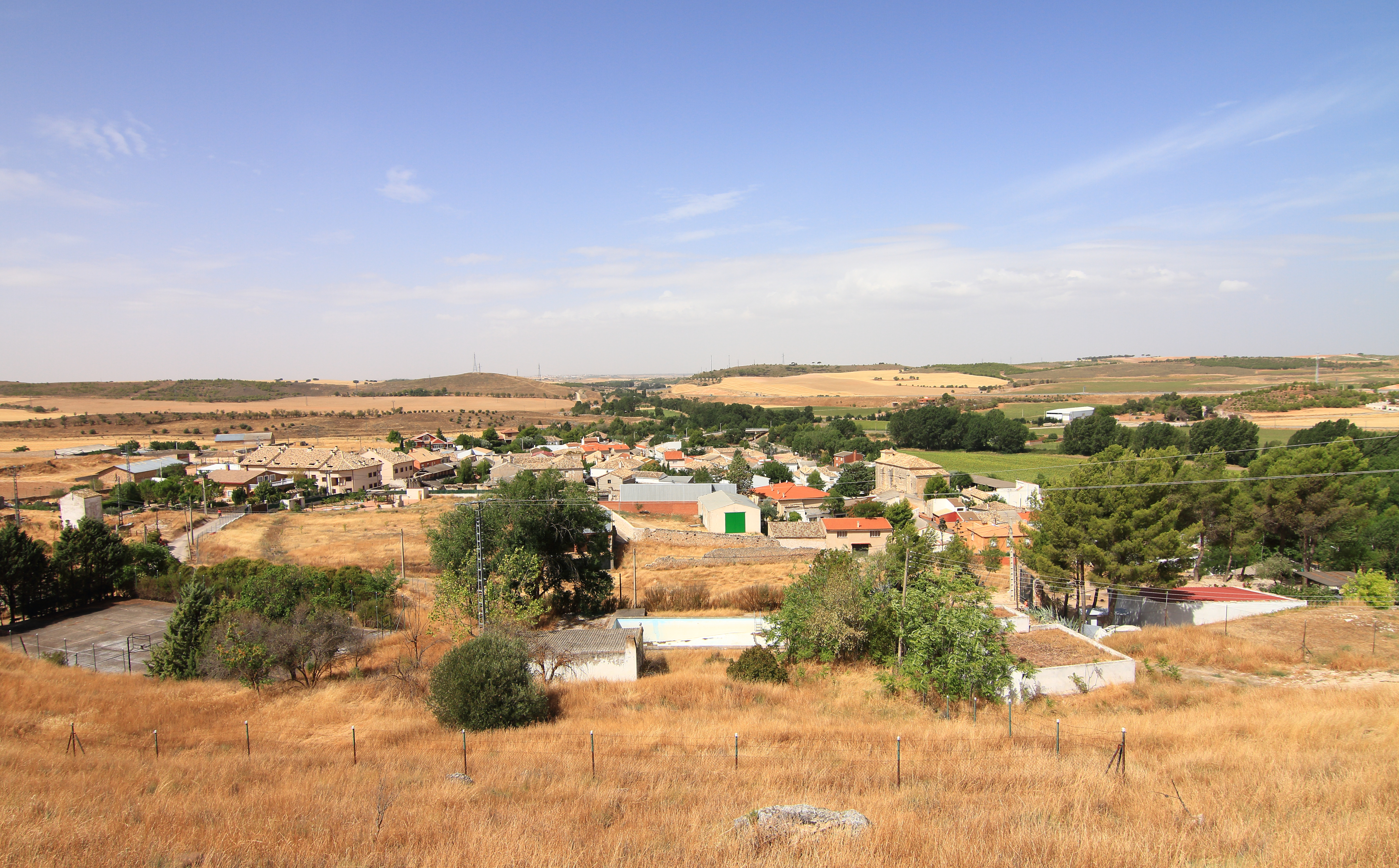 Huelves